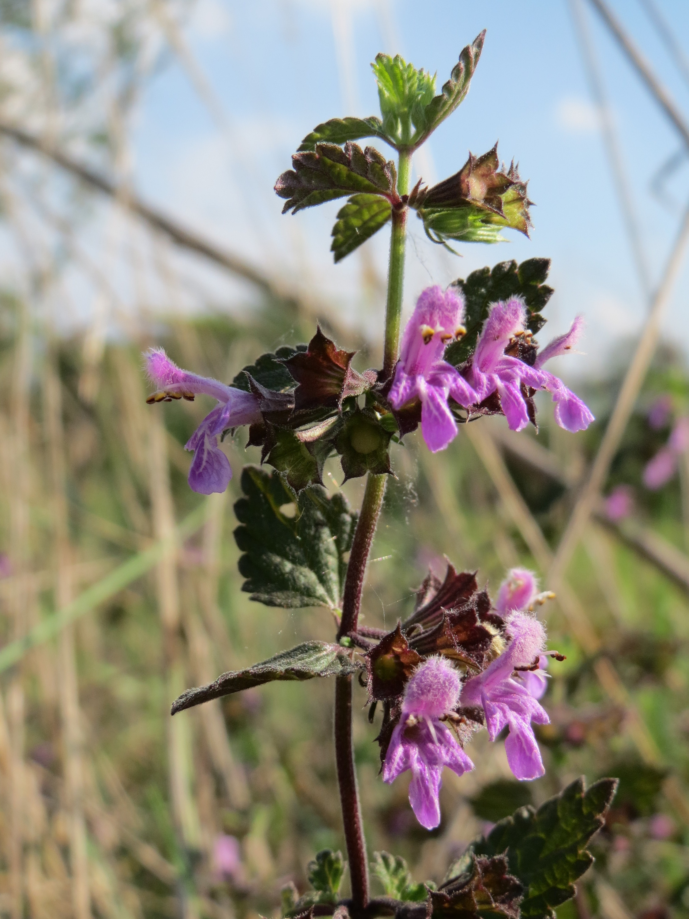 Schwarznessel (Ballota nigra) im Landschaftsschutzgebiet Hockenheimer Rheinbogen